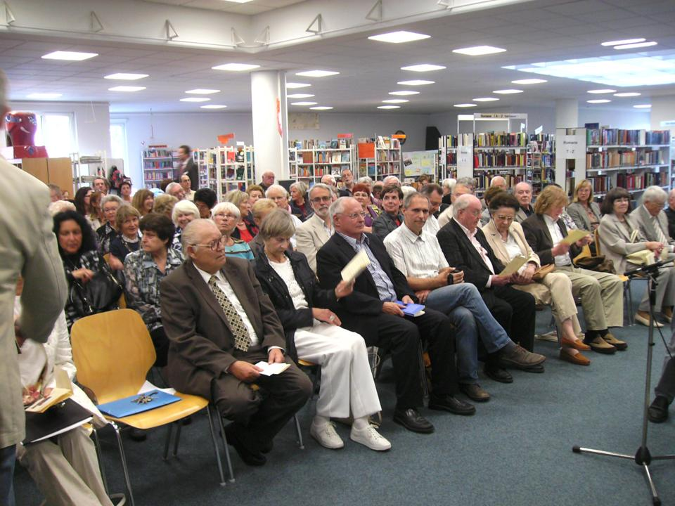 30-Jahr-Feier des St. Ingberter Literaturforums (ILF) mit Johannes Kühn, Oskar Lafontaine, Ludwig Harig und Alfred Gulden in der ersten Reihe